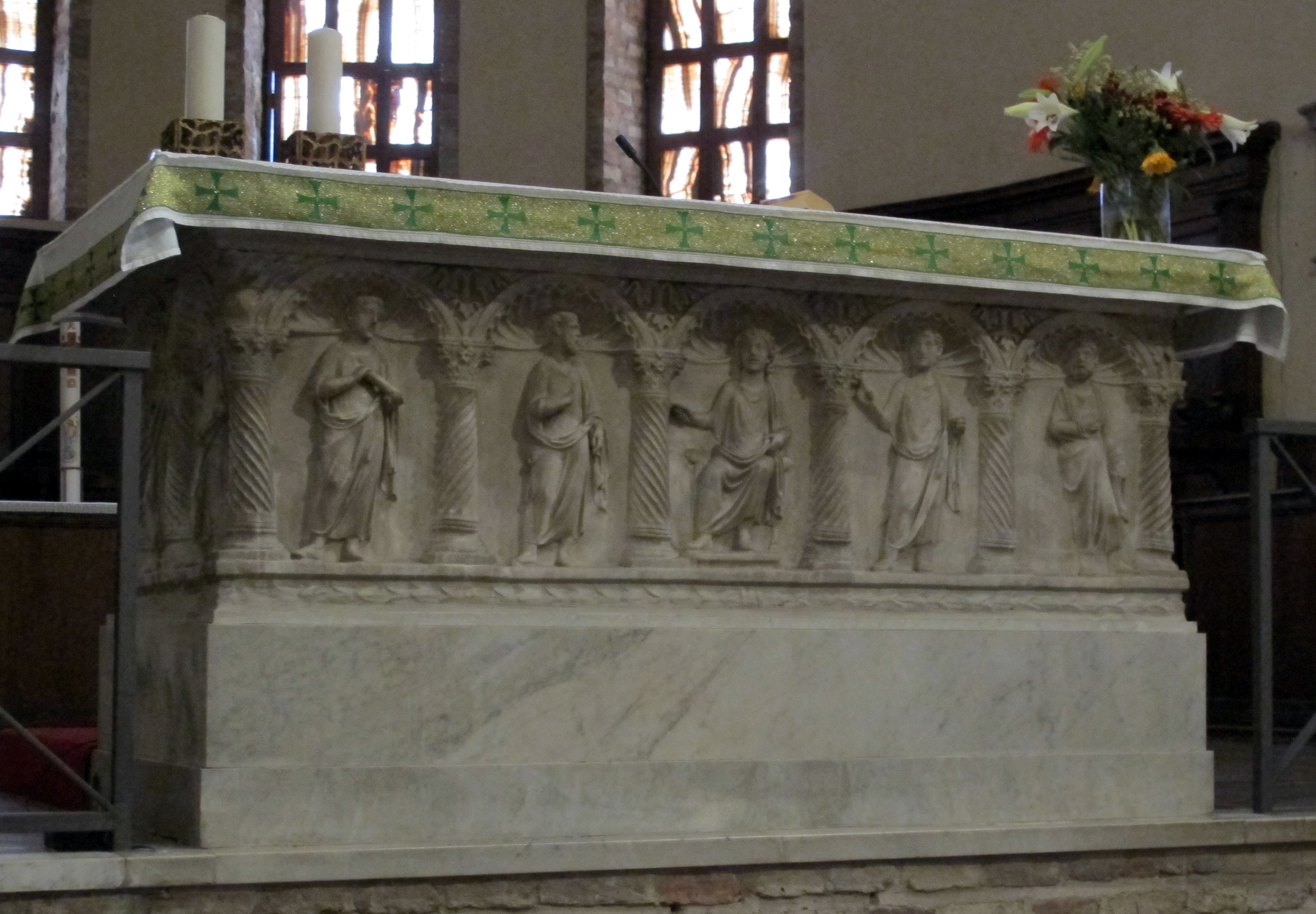 Chiesa di San francesco a Ravenna: l'altare maggiore, costituito dal sarcofago del vescovo Liberio III degli inizi del V secolo, che presenta, sui due lati lunghi, cinque figure entro archi sorretti da colonne tortili.